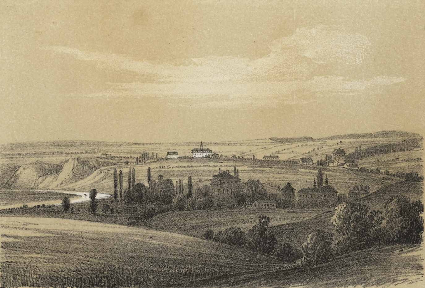 Libeň